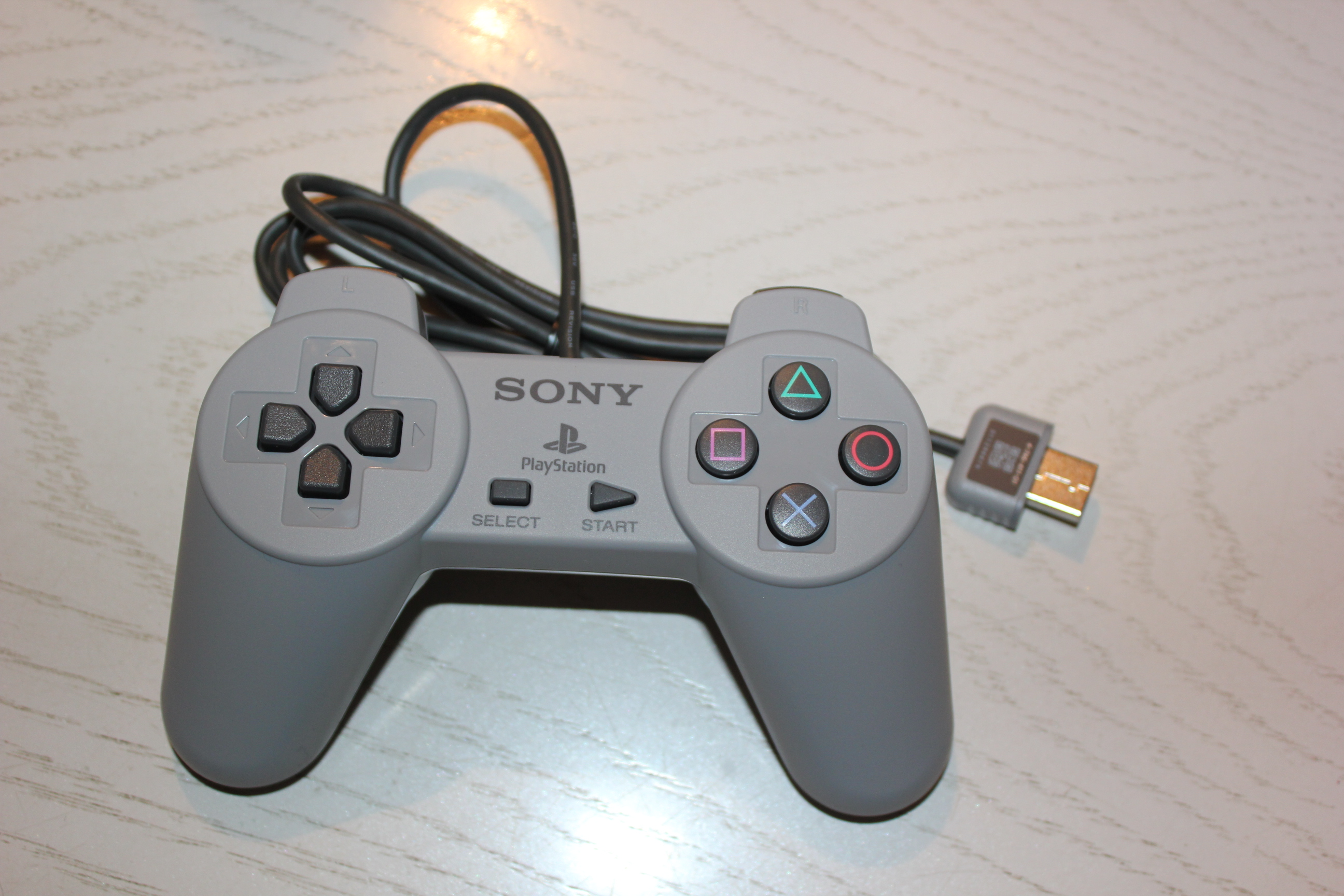 PlayStation Classic Controller